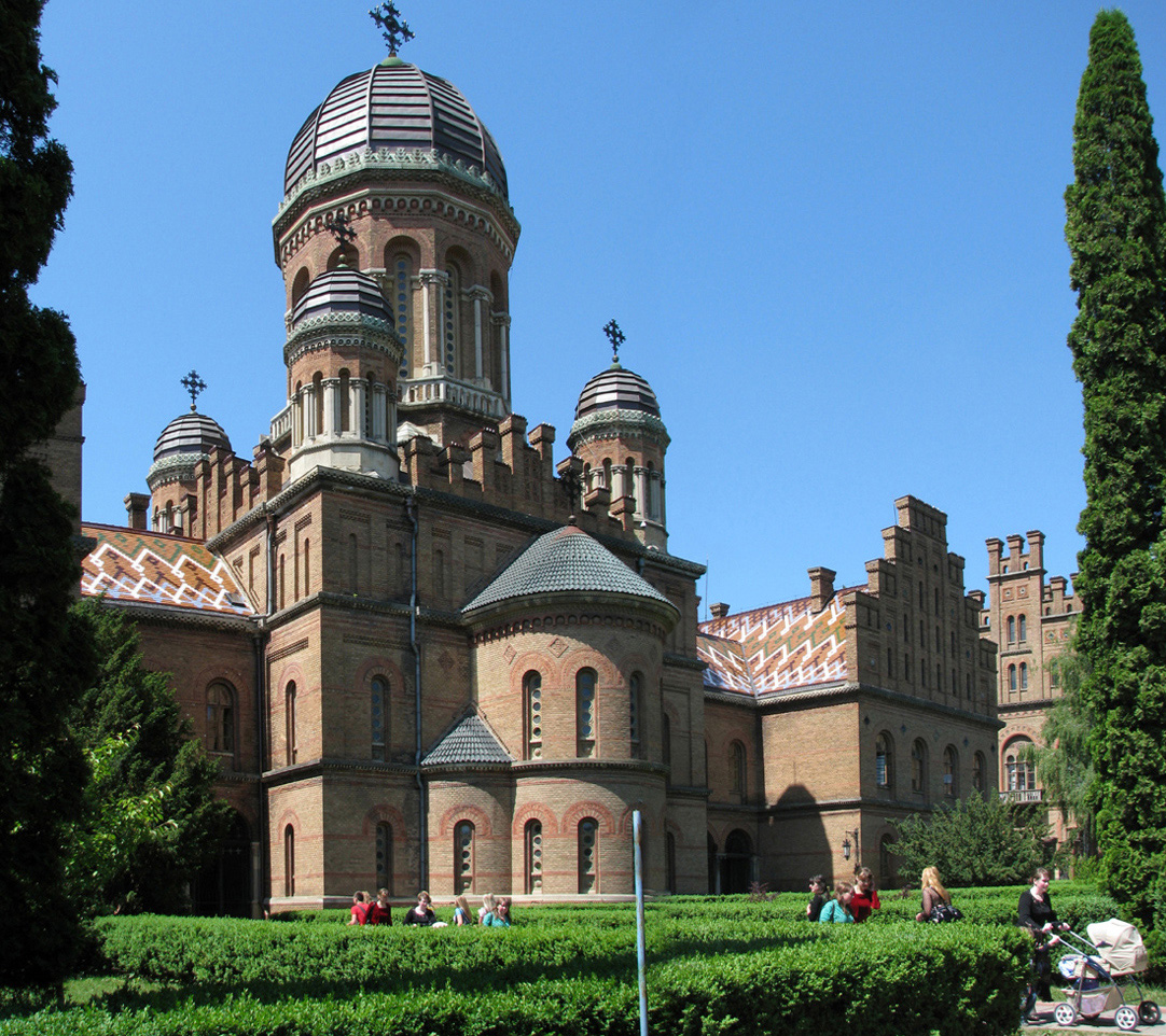 Резиденция буковинских митрополитов (церковь Трёх Святителей) в Черновцах